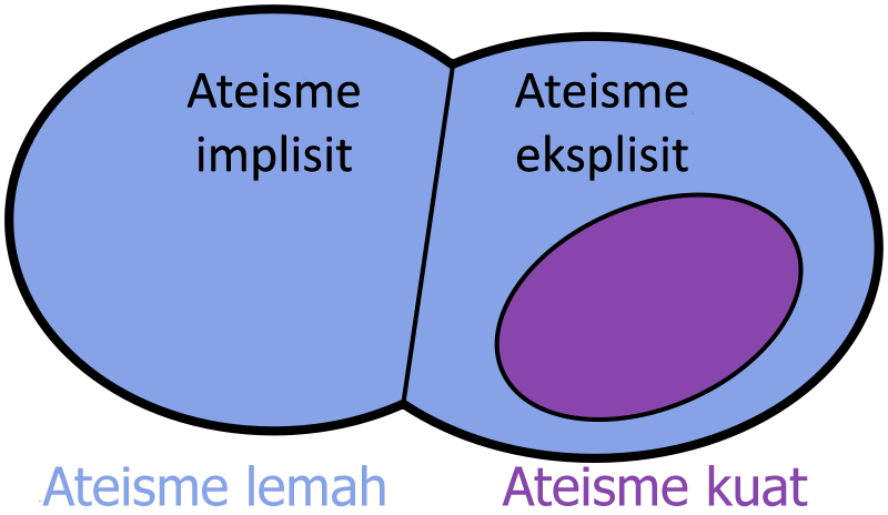 Dari Dibawah pub domain